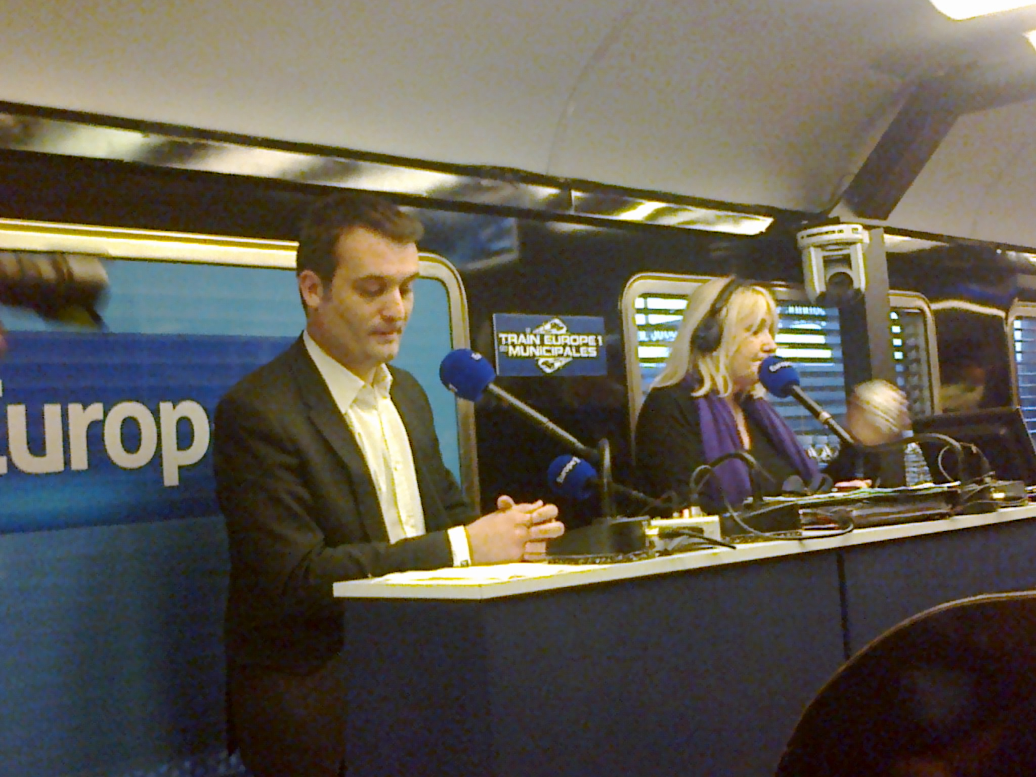 Florian Philippot et Julie Leclerc lors de la matinale d'Europe 1 en Gare de Lyon à Paris le 21 mars 2014.